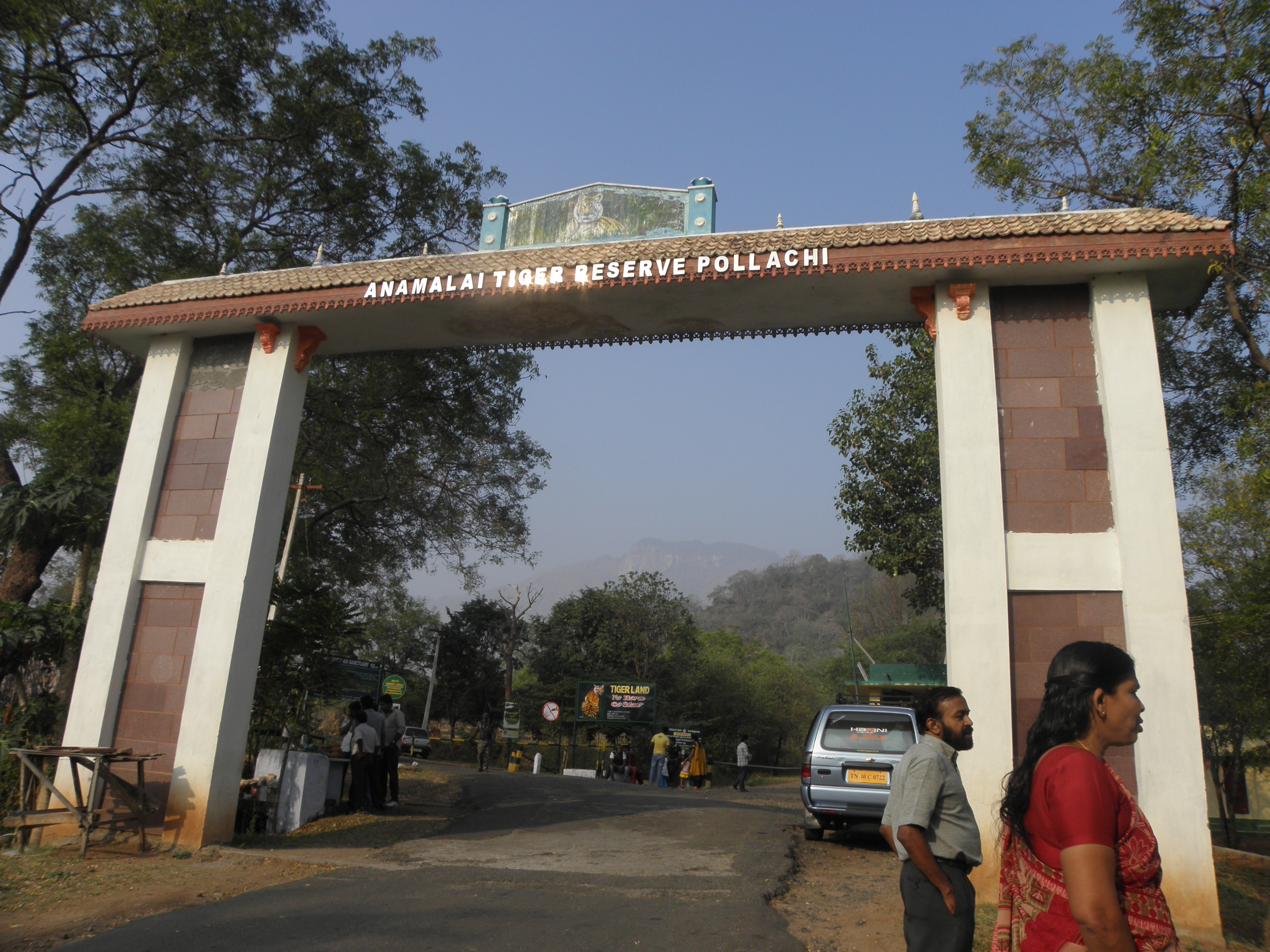 ആനമല ടൈഗർ റിസർവിന്റെ കവാടം